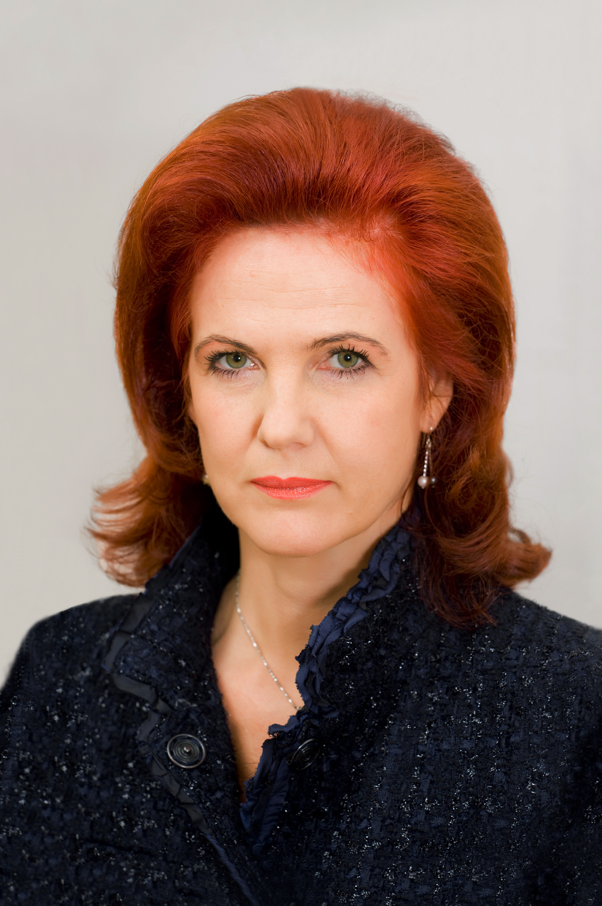 Foto: Jānis Deinats